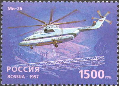 Почтовая марка России